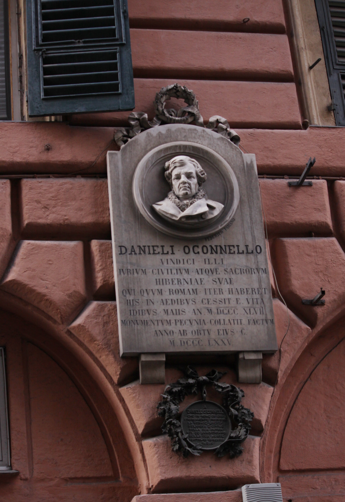 A Daniel O'Connell che in nome di Dio strenuamente propugnò la verace libertà religiosa e civile della sua patria nel 50° anniversario della sua morte. I cattolici genovesi